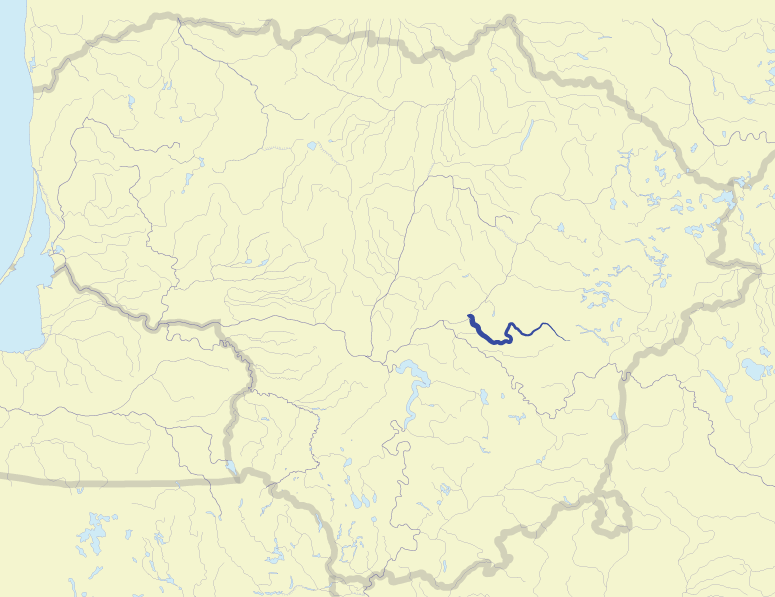 River Širvinta